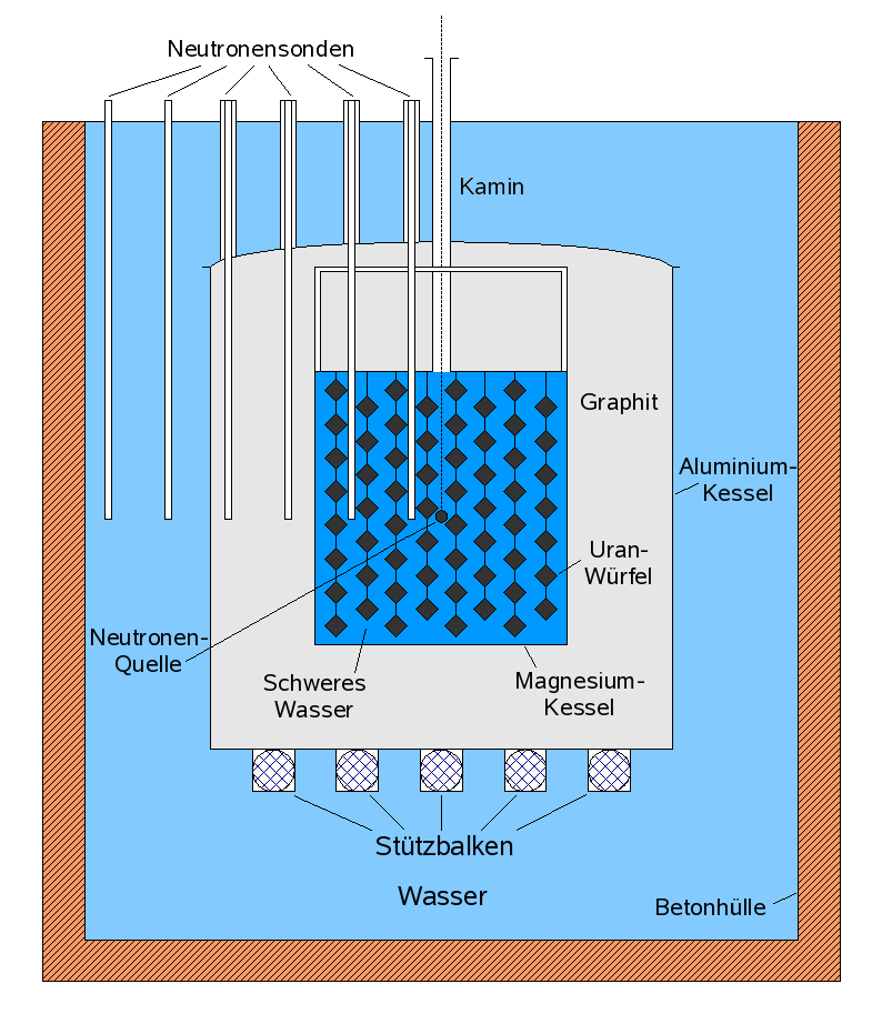 Aufbau des Forschungsreaktors Haigerloch (Skizze)